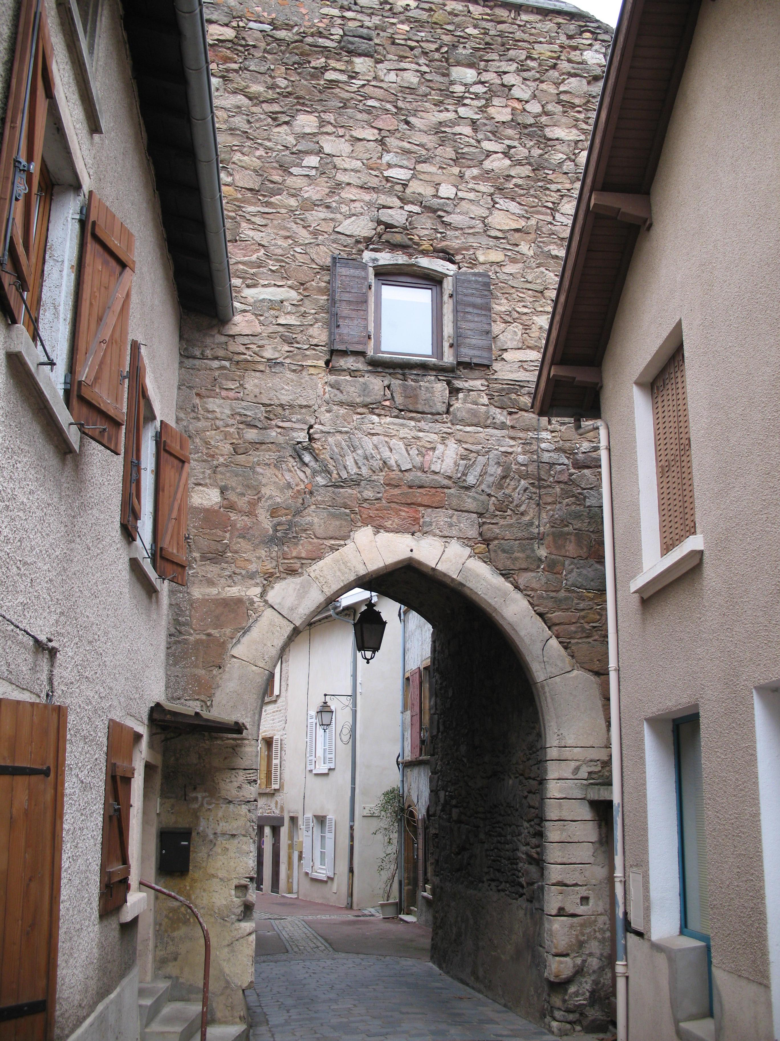 Porte du Plantin, seul vestige d'un ancien fort, à Chasselay (Rhône)